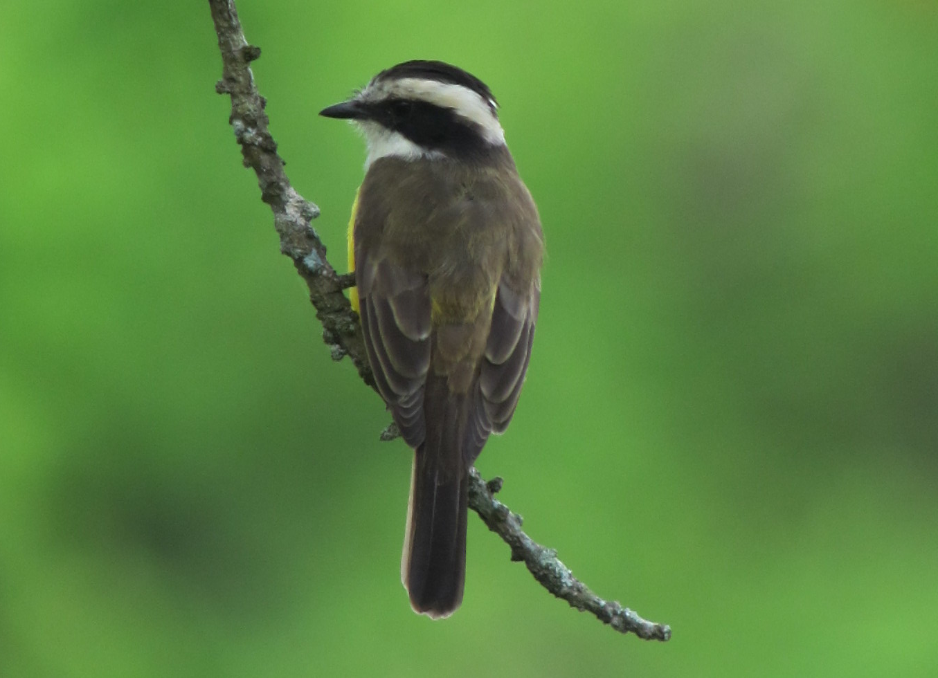 Arauca, Arauca, Colombia